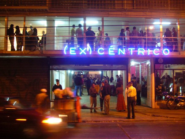 (Ex) Céntrico es un Centro Cultural de España en ciudad de Guatemala.